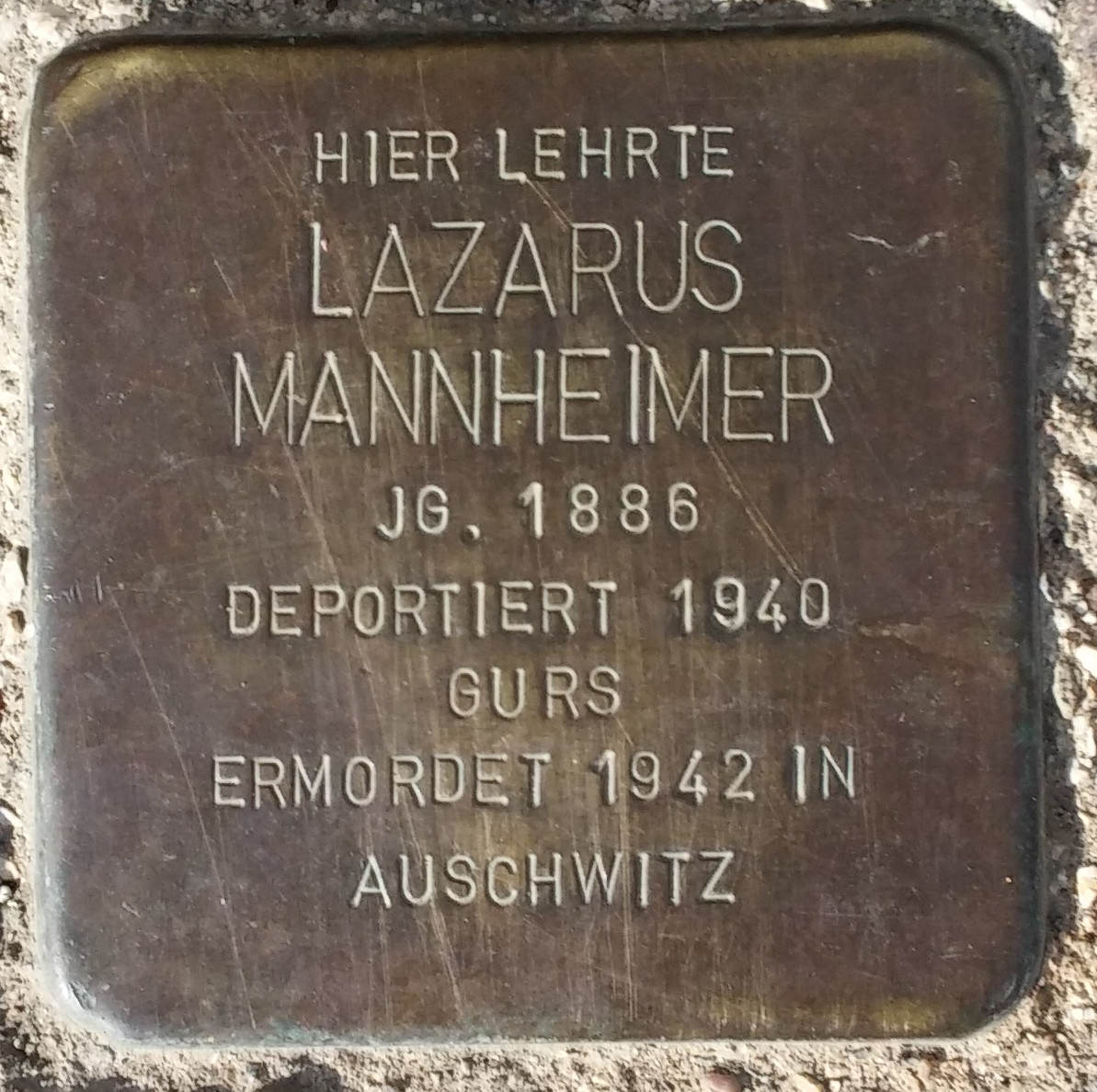 Stolpertein Lazarus Mannheimer, vor Eingang Falkenhausenschule Kehl am Rhein, November 2017